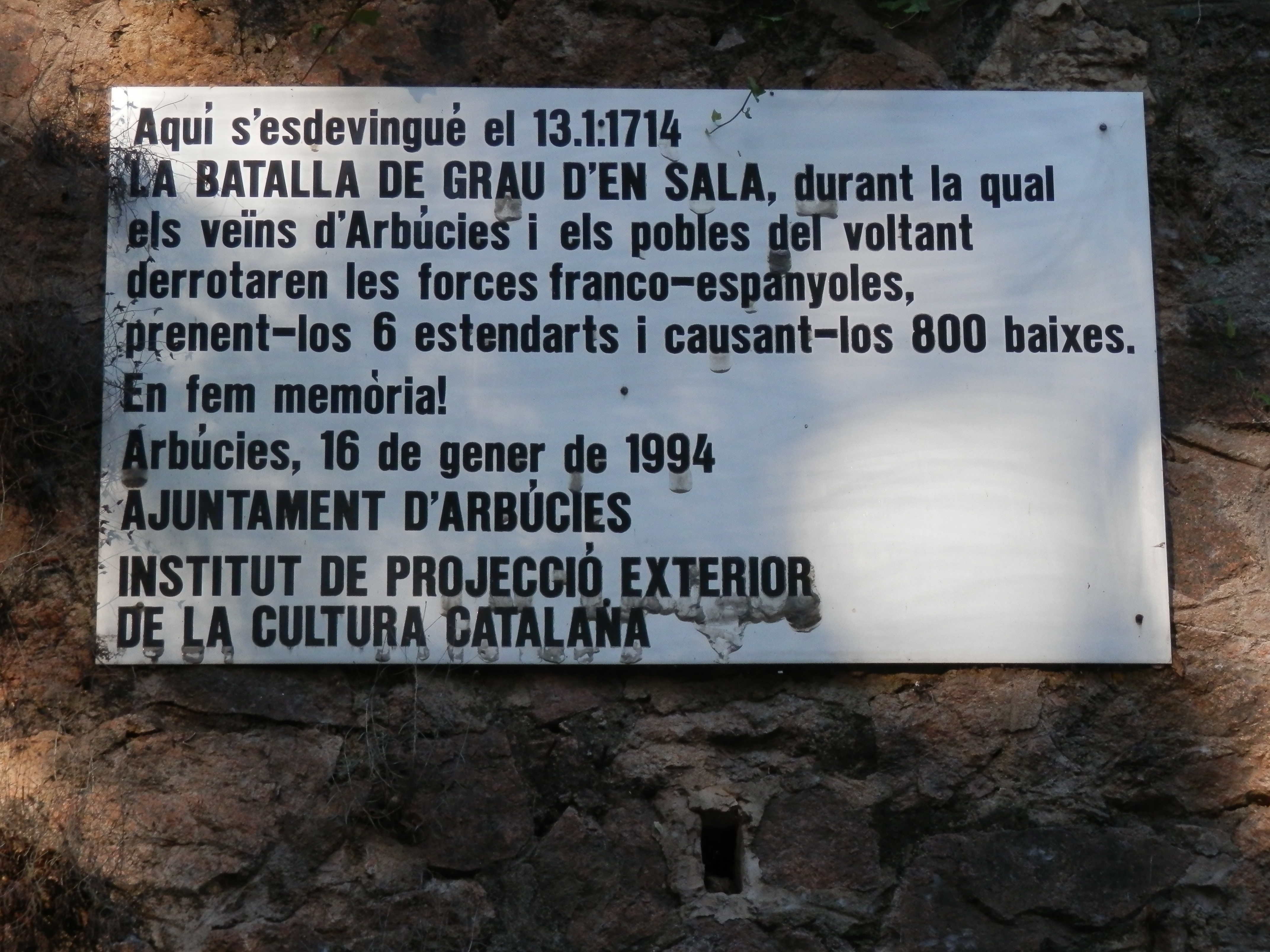 Placa en memòria dels combatents de la Batalla d'Arbúcies del 13 de gener de 1714.